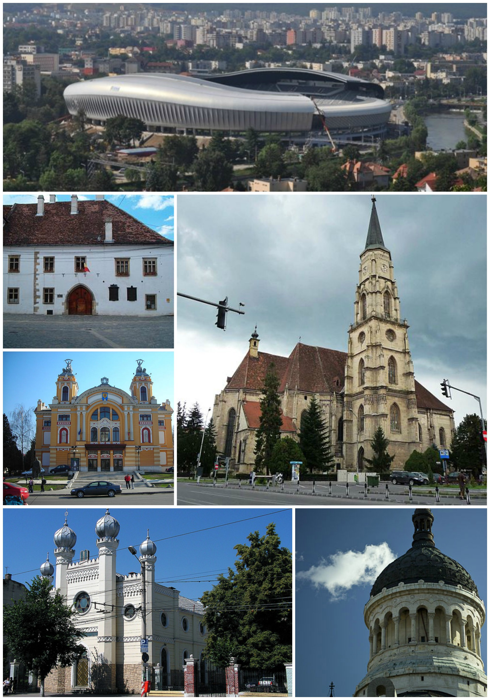 colaj Cluj-Napoca